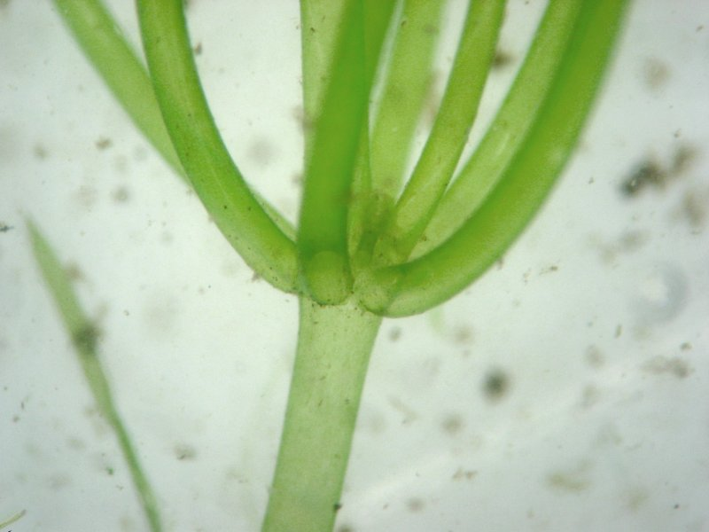 Stachelspitzige Glanzleuchteralge Nitella mucronata, Astquirl, Müritz-Gebiet